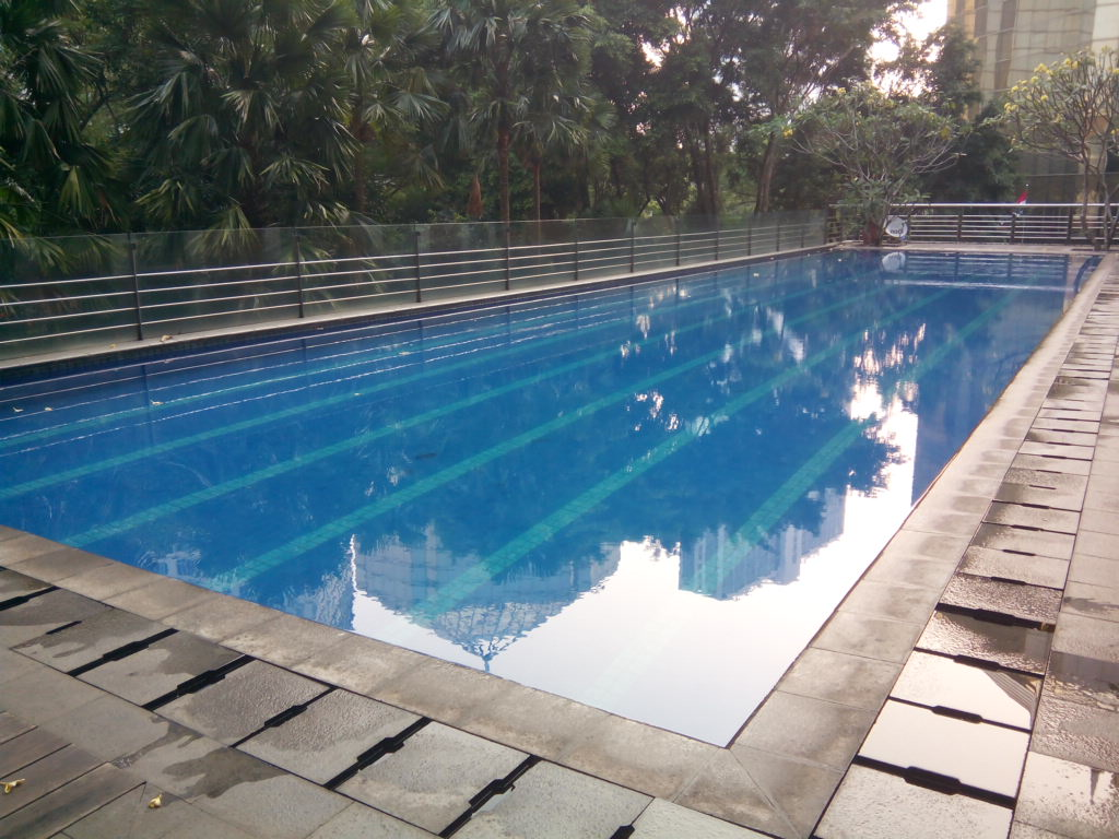 Universitas Pelita Harapan